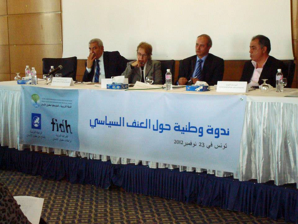 Tunisian human rights defenders seek solutions to the increase in political violence and radicalism. منى يحيى - الناشطون الحقوقيون التونسيون يسعون إلى إيجاد حلول للعنف السياسي والتطرف المتزايدين Les défenseurs des droits de l'Homme en Tunisie sont en quête de solutions à apporter à la violence politique et à l'extrémisme.